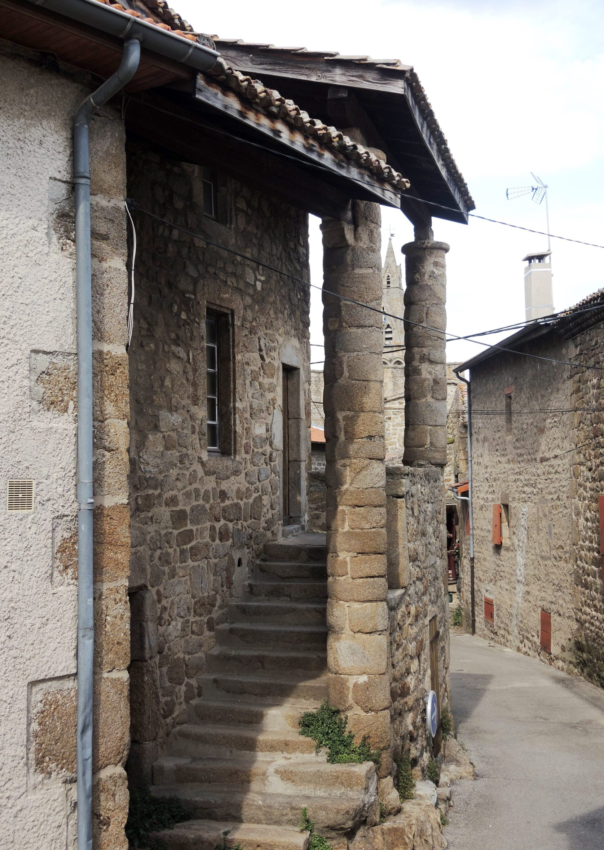 Quintenas maison aux fromages